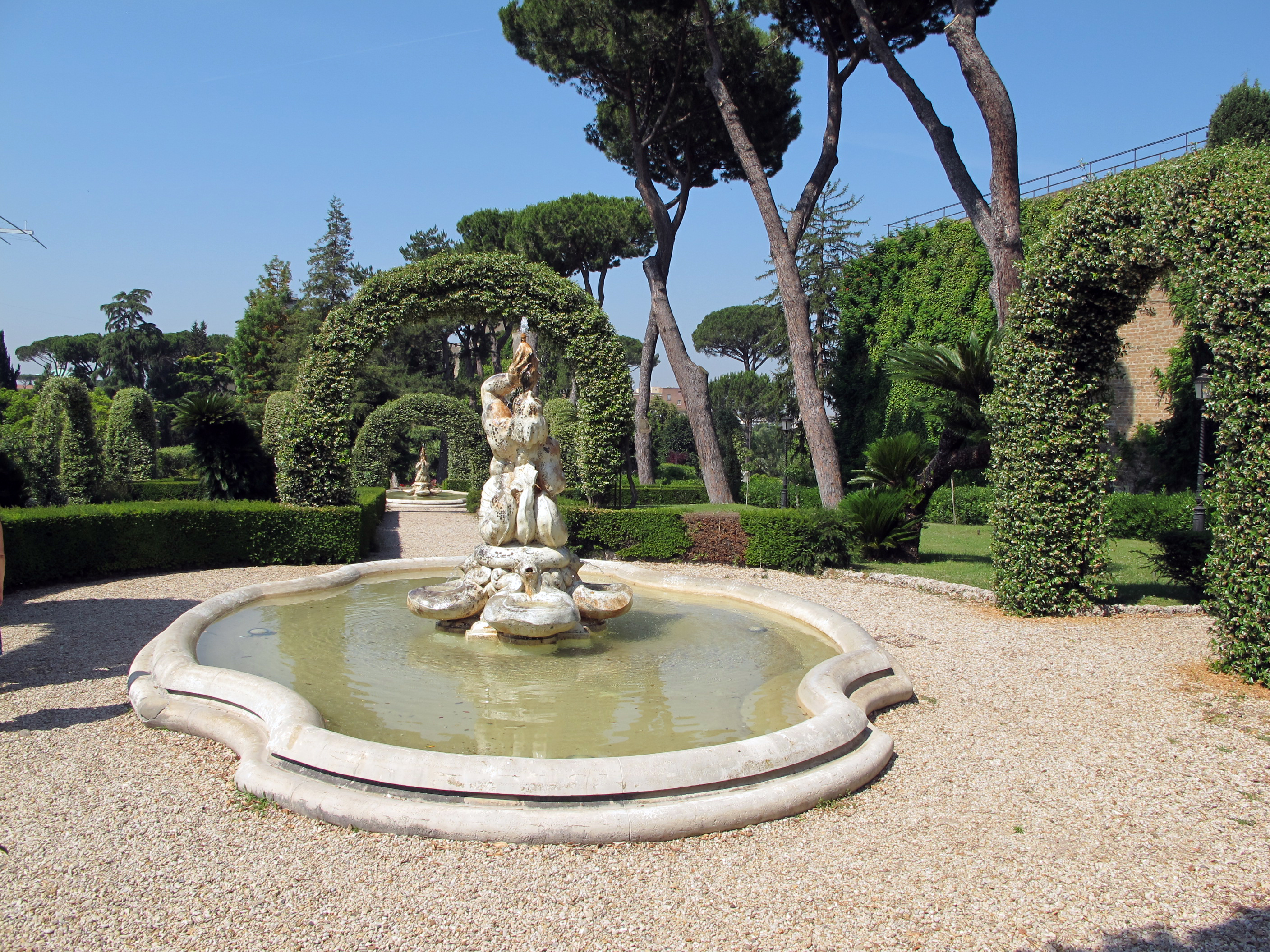 Giardini Vaticani